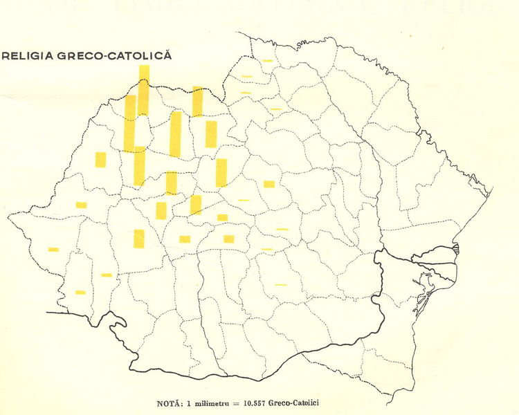 Mapa de la divisió territorial de l'Església Romanesa Unida l'any 1930.